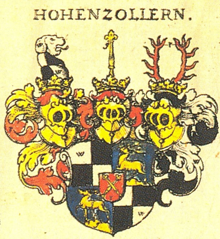 Johann Siebmacher: New Wappenbuch eingescannt aus: Horst Appuhn (Hrsg.), Johann Siebmachers Wappenbuch. Die bibliophilen Taschenbücher 538, 2. verb. Aufl , Dortmund 1989 Wappen der Grafen von Hohenzollern aus Blatt 14 Siebmachers Wappenbuch